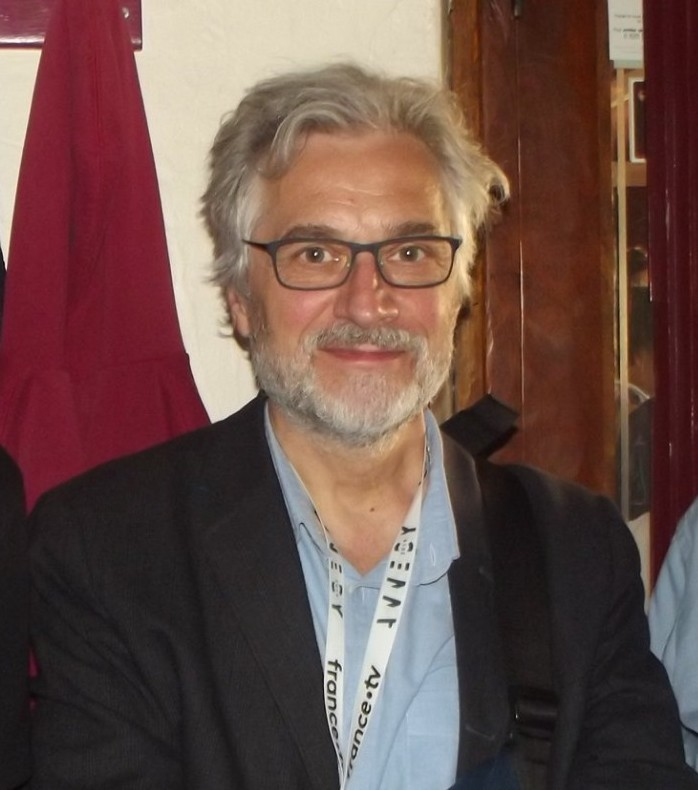 Michael Dudok de Wit au festival international du film d'animation d'Annecy 2019.